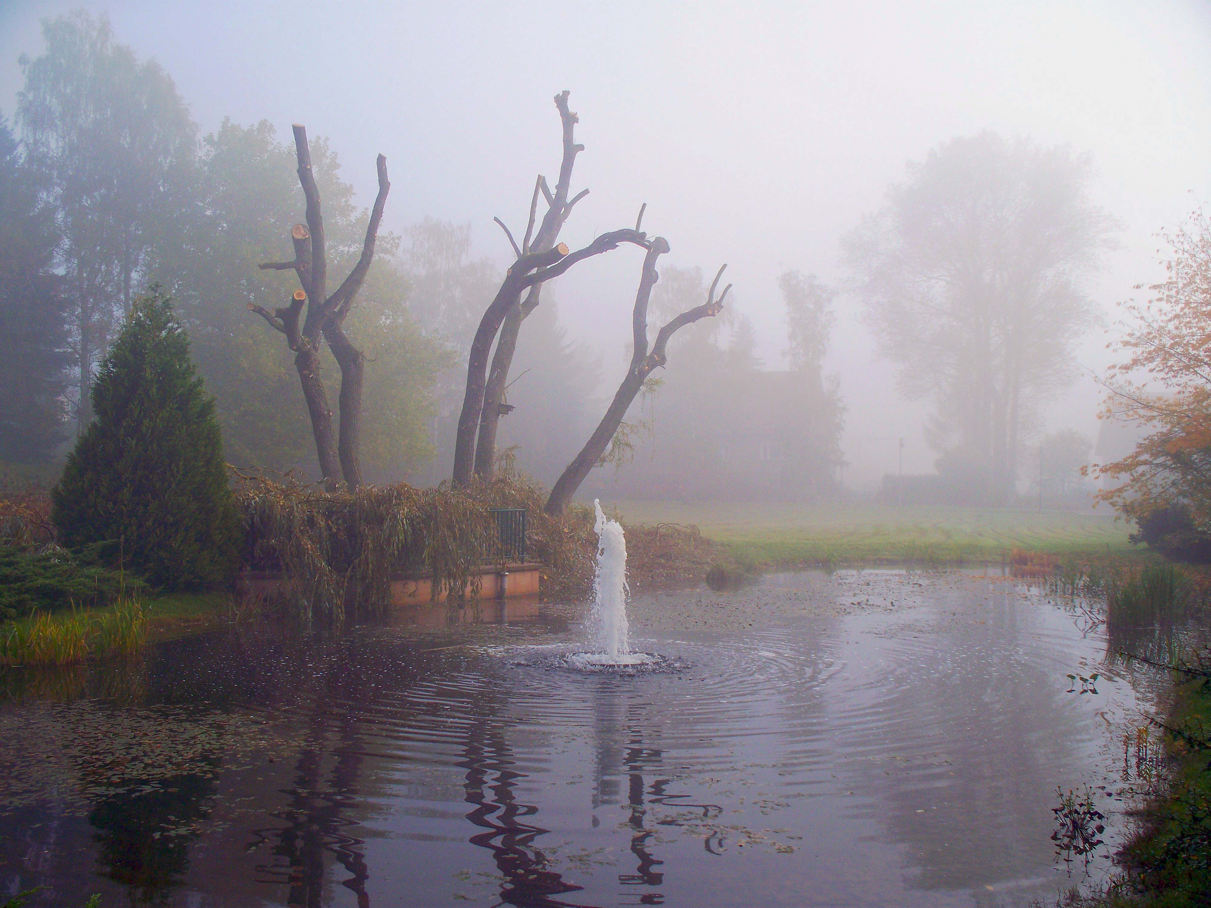 Kurpark Bad Klosterlausnitz